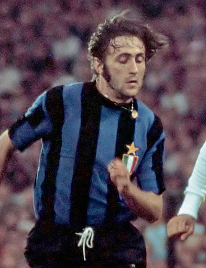 Rotterdam, 31 mei 1972, finale Europacup I in Feijenoord stadion: AFC Ajax tegen FC Internazionale Milano 2-0; Mauro Bellugi in aktie.